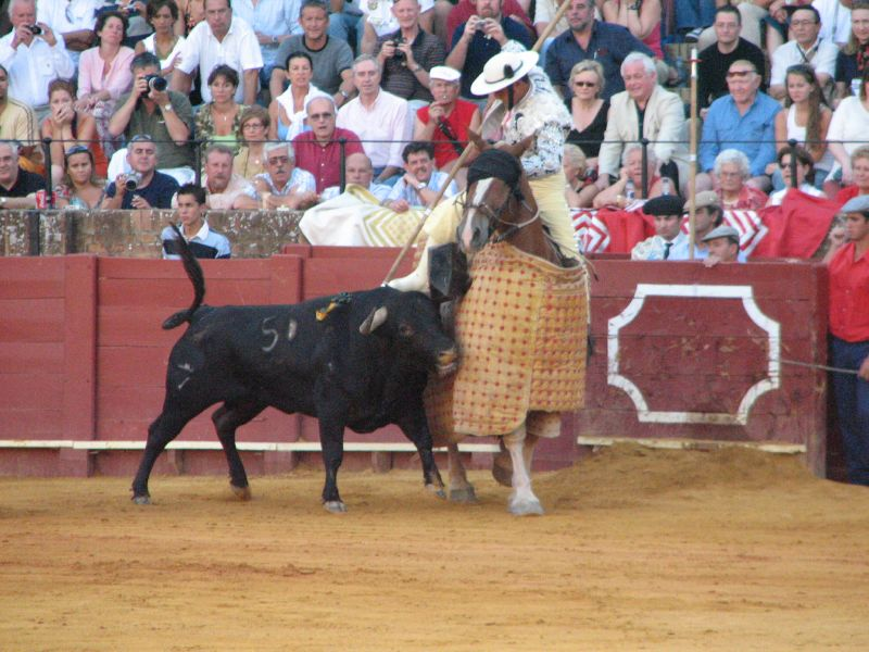 Corrida en la Maestranza sevillana